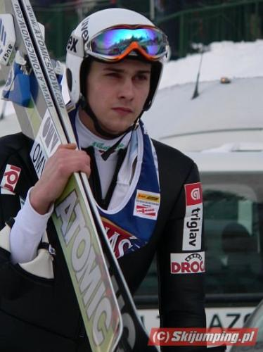 Jure Bogataj